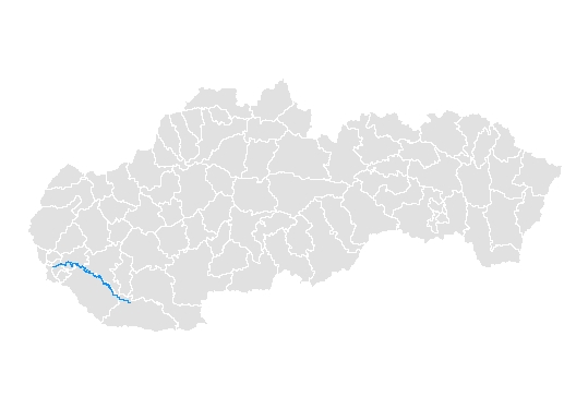 Mapa toku Malého Dunaja